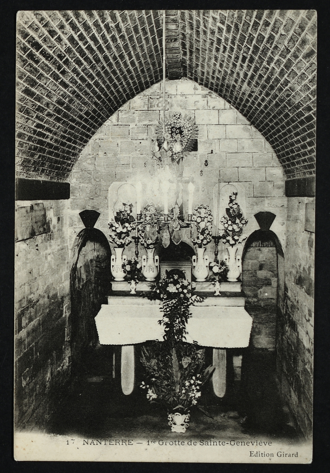 Nanterre.Première grotte de Sainte-Geneviève